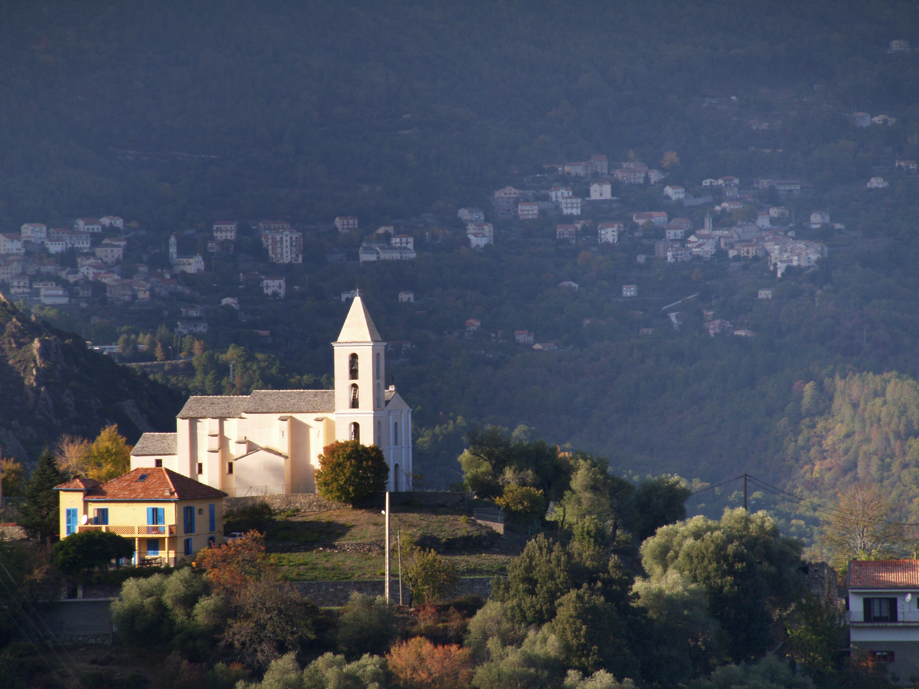 Noceta, Centre Corse (Corse) - Église Saint-Paul